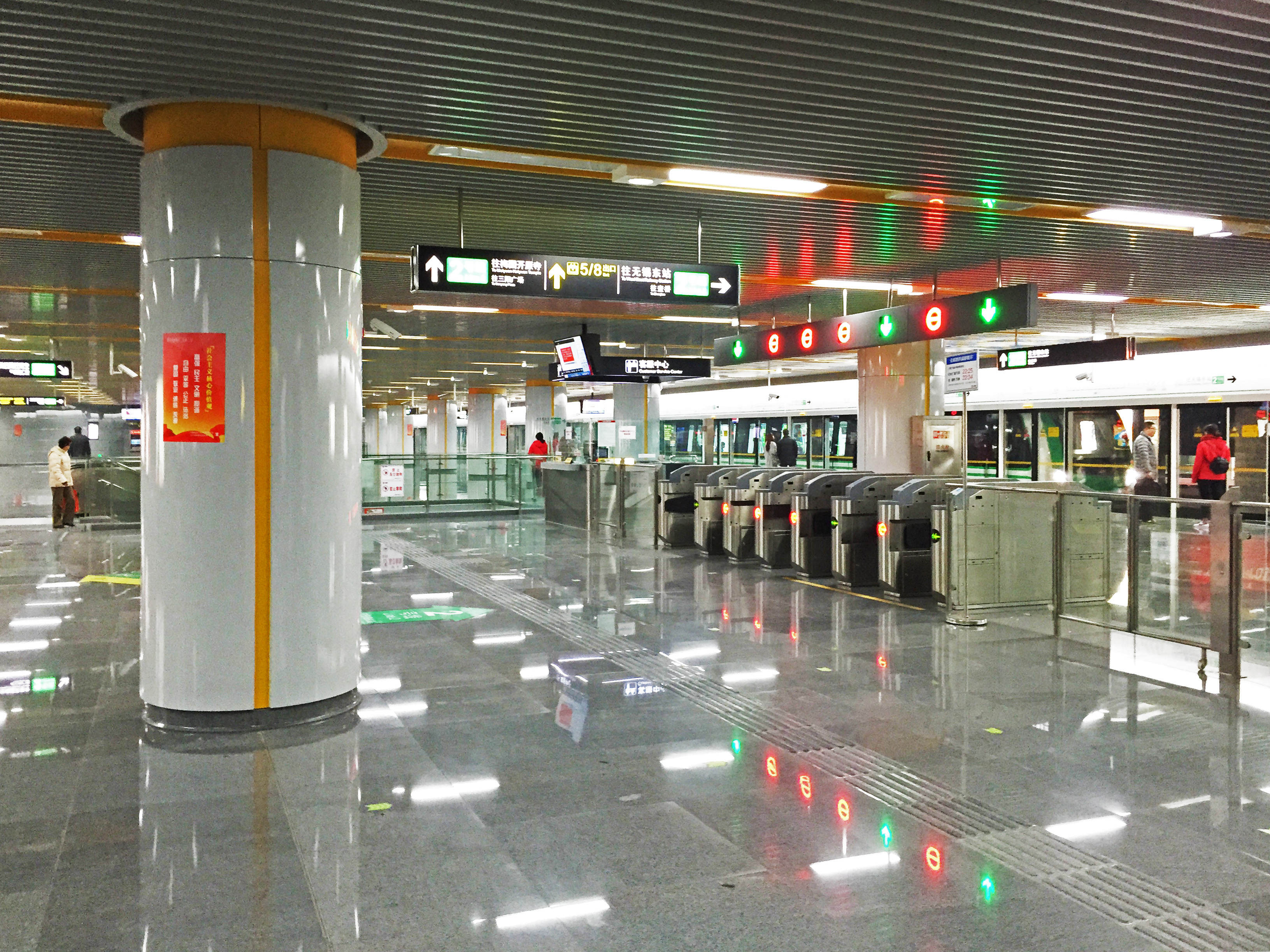 無錫地鐵東亭站，是一個站臺與站廳處於同一樓層的特殊地下站點